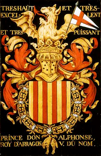 Escudo de armas del rey Alfonso V de Aragón el Magnánimo como caballero de la Orden del Toisón de Oro, a la que accedió tras su séptimo capítulo de Gante, 1445. Leyenda: TRÈS HAÙT ET TRÈS EXCELLENT ET TRES PÙISSANT PRINCE DON ALPHONSE, ROY D'ARRAGON V. DÙ NOM.